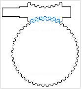 Envolvência do sistema globoidal